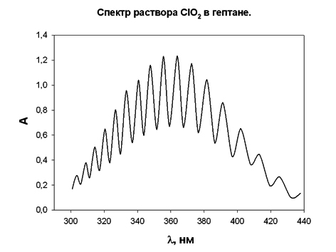 Спектр ClO2 в гептане